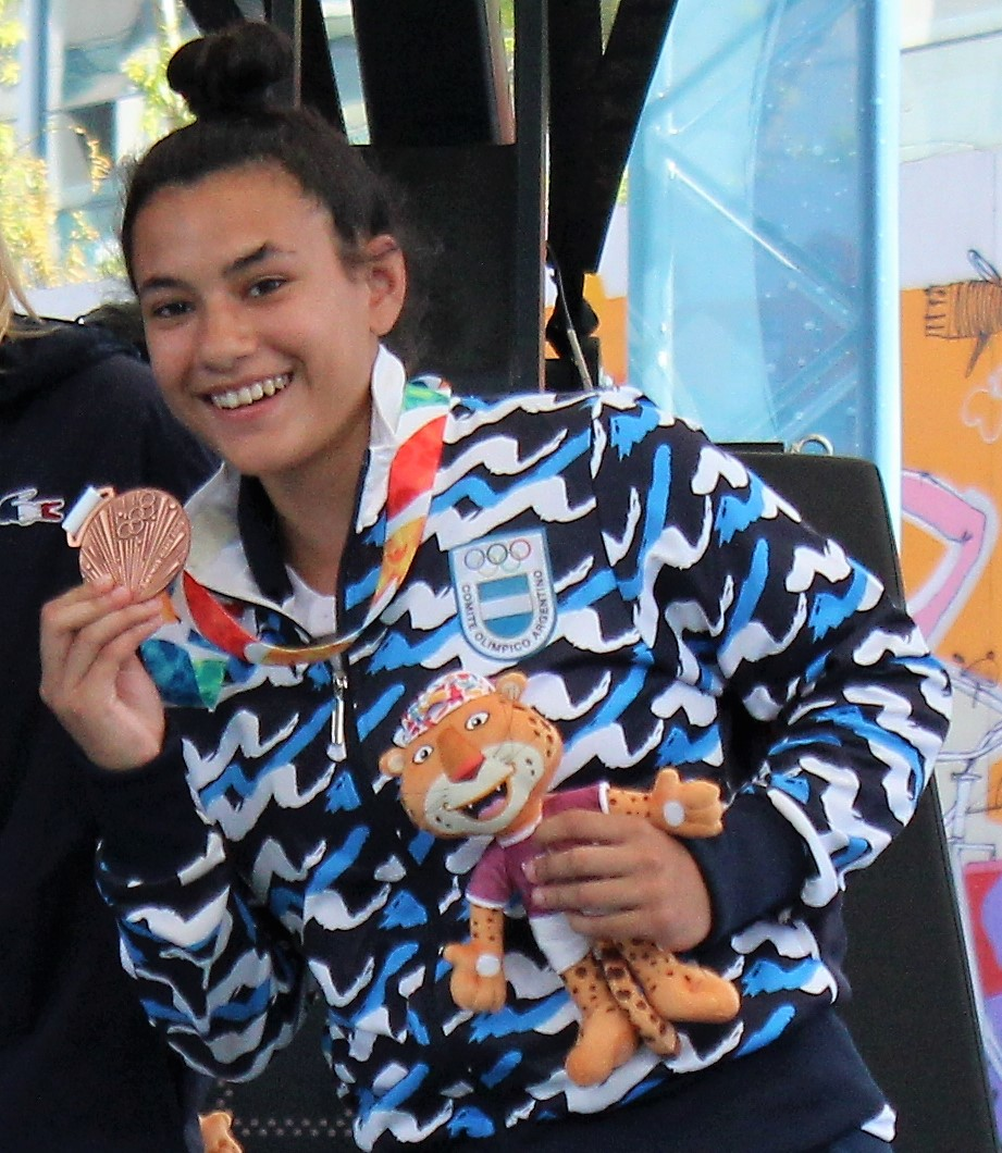 Sofía Acevedo en el concurso de lanzamiento de mujeres, en básquet. JJOO de la Juventud Buenos Aires 2018.